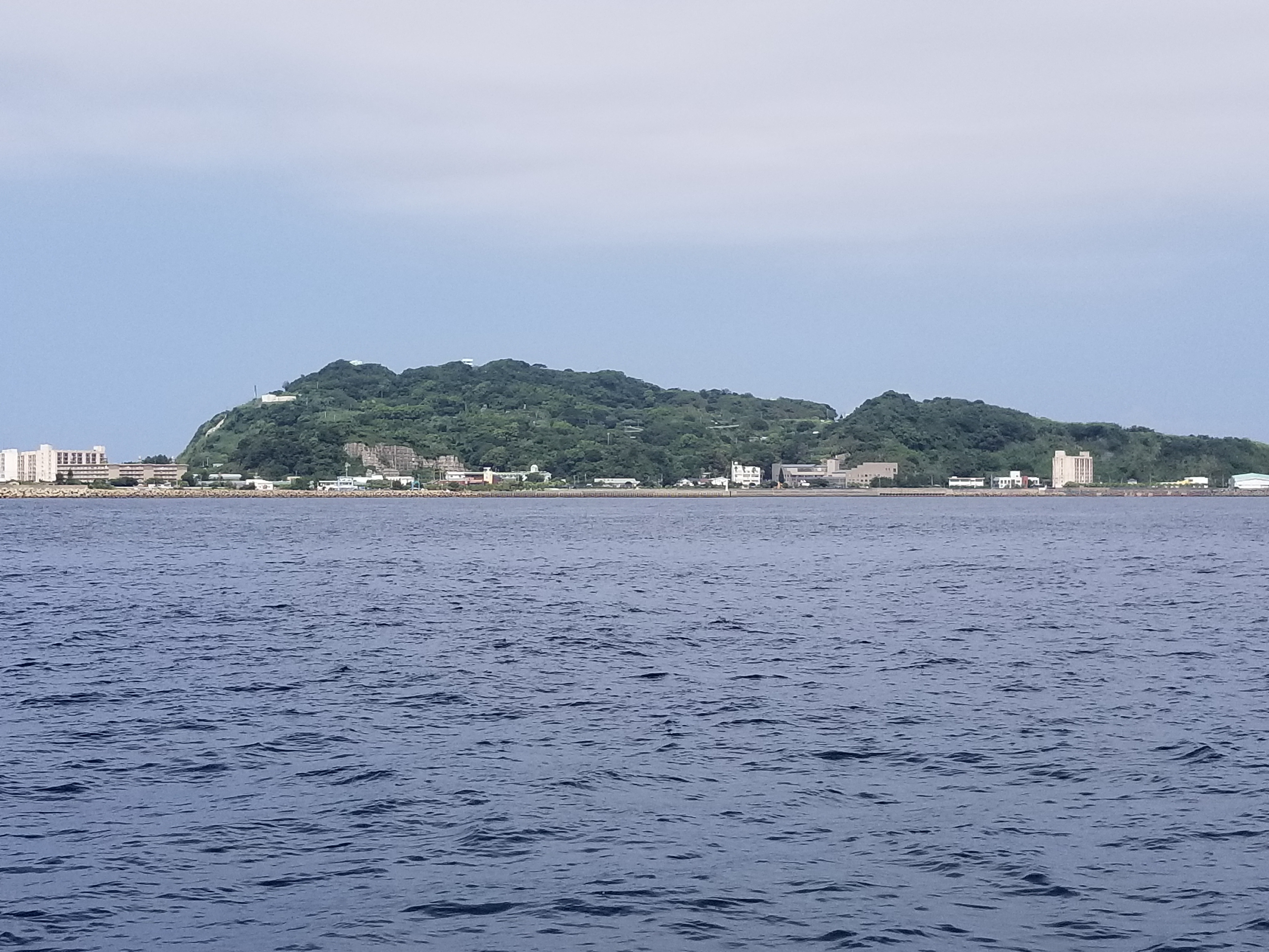 高島（長崎県長崎市）